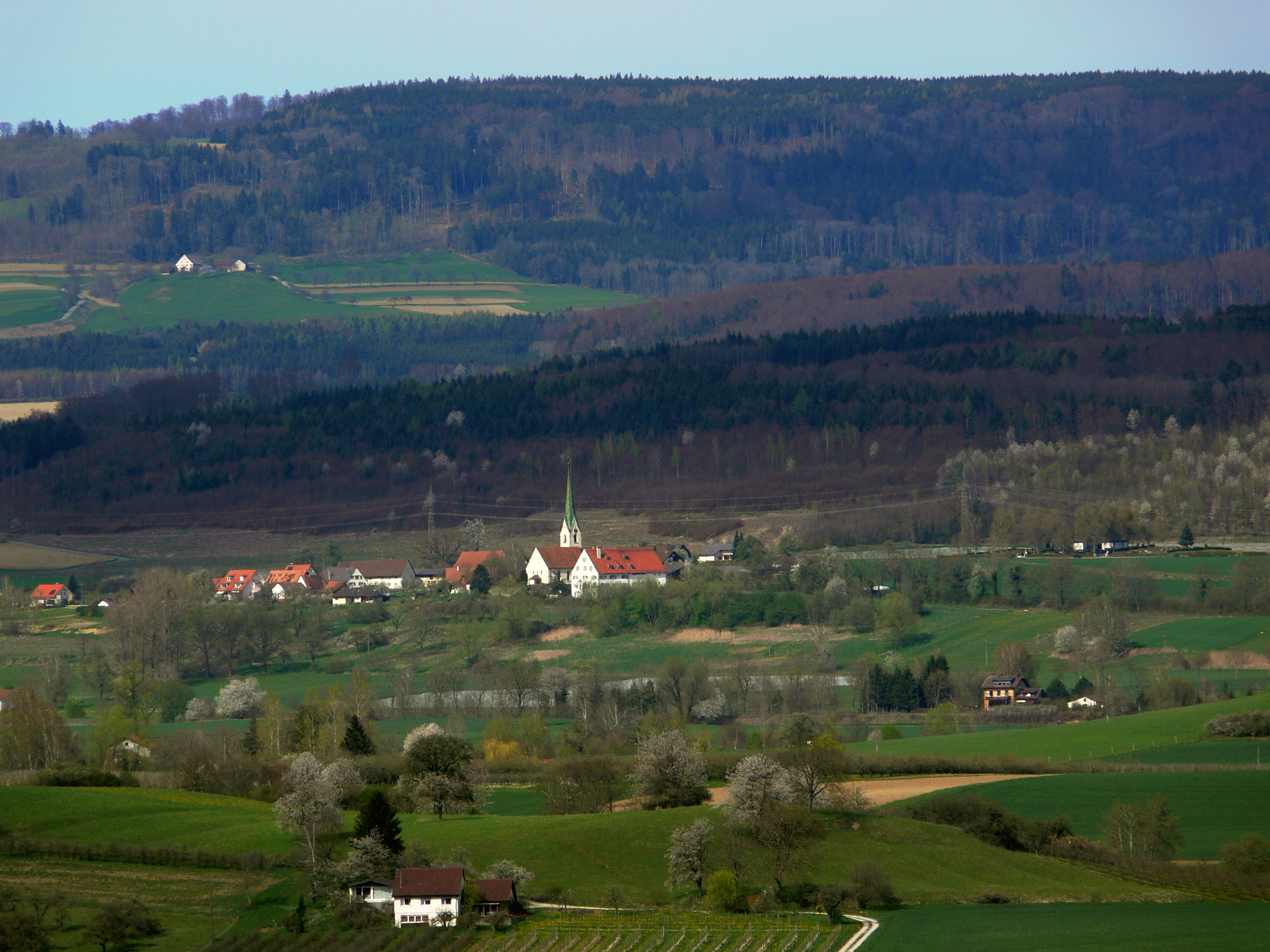 Blick von der Wallfahrtskirche Baitenhausen (Stadt Meersburg), Bodenseekreis in Richtung Leutkirch (Ortsteil von Salem-Neufrach) mit der alten Pfarrkirche Mariä Himmelfahrt